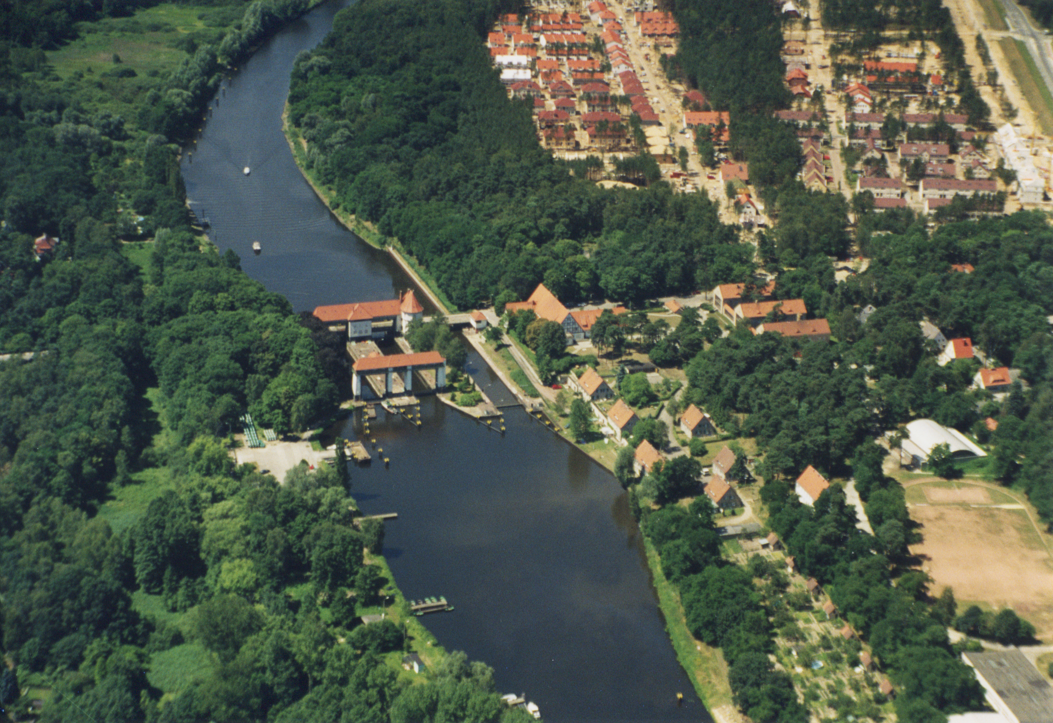 Schleusenanlage Kleinmachnow und Siedlung Stolper Weg, Luftaufnahme 1997